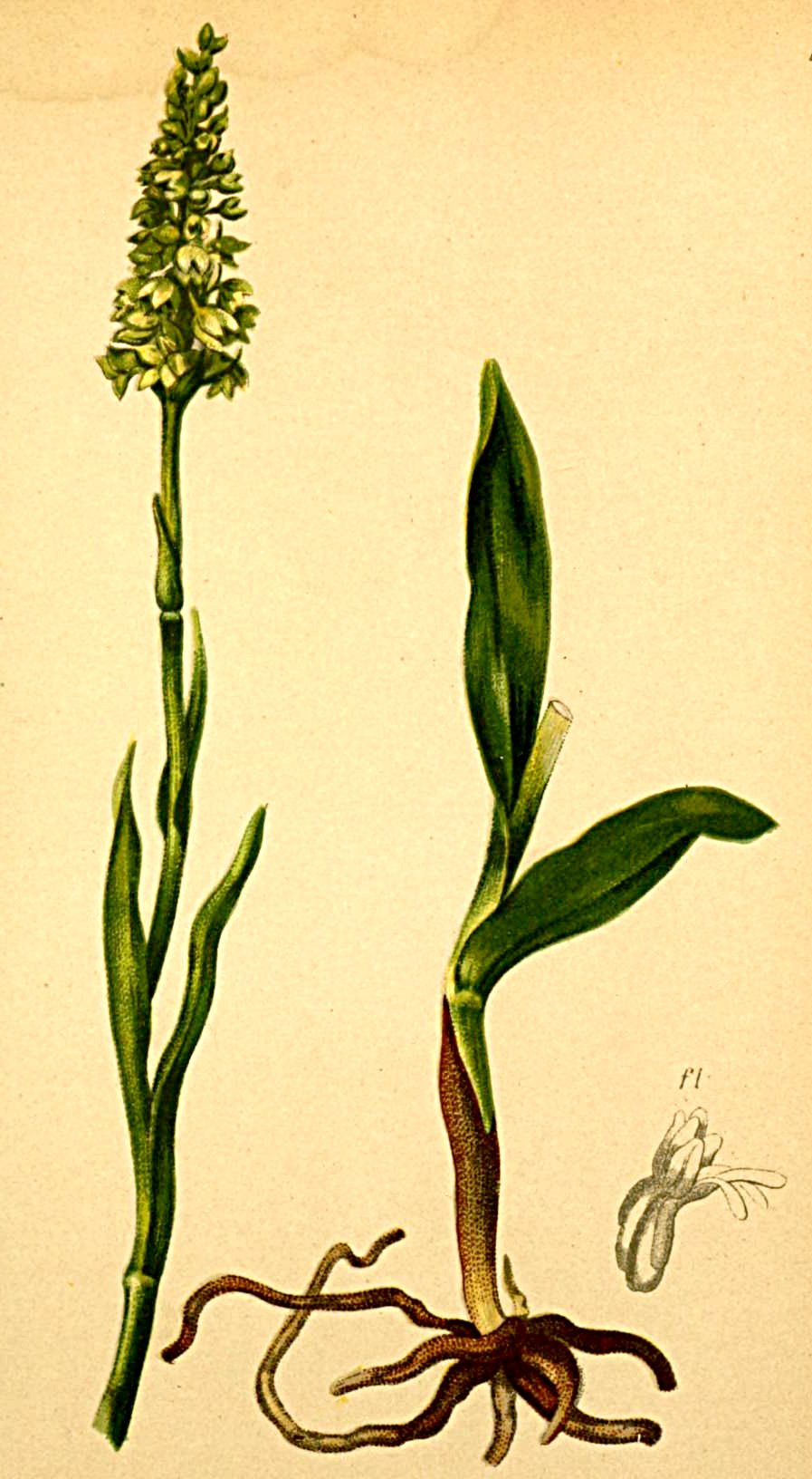 Coeloglossum albidum (Pseudorchis albida)